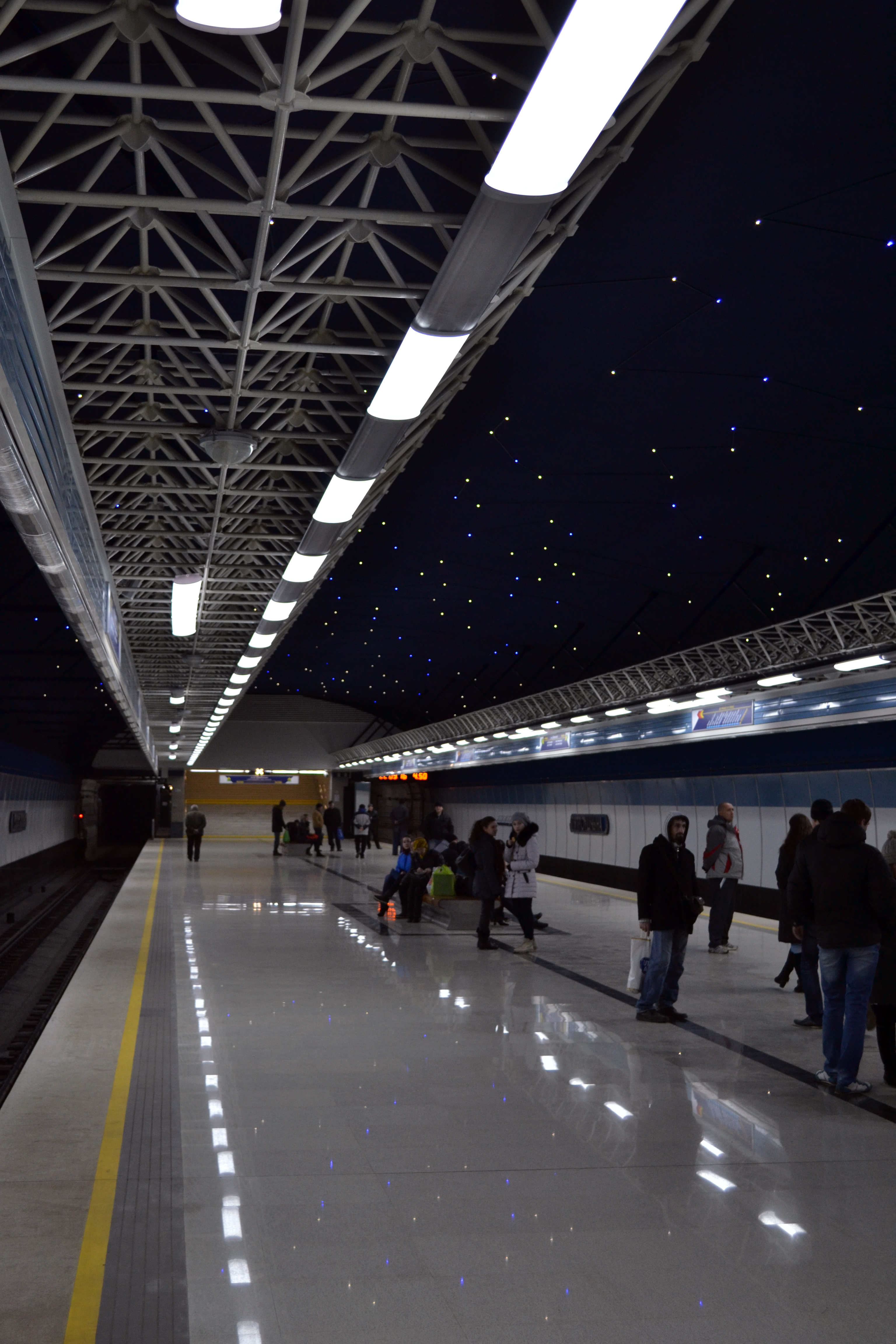 Беларуская (тарашкевіца): Станцыя мятро Пятроўшчына.